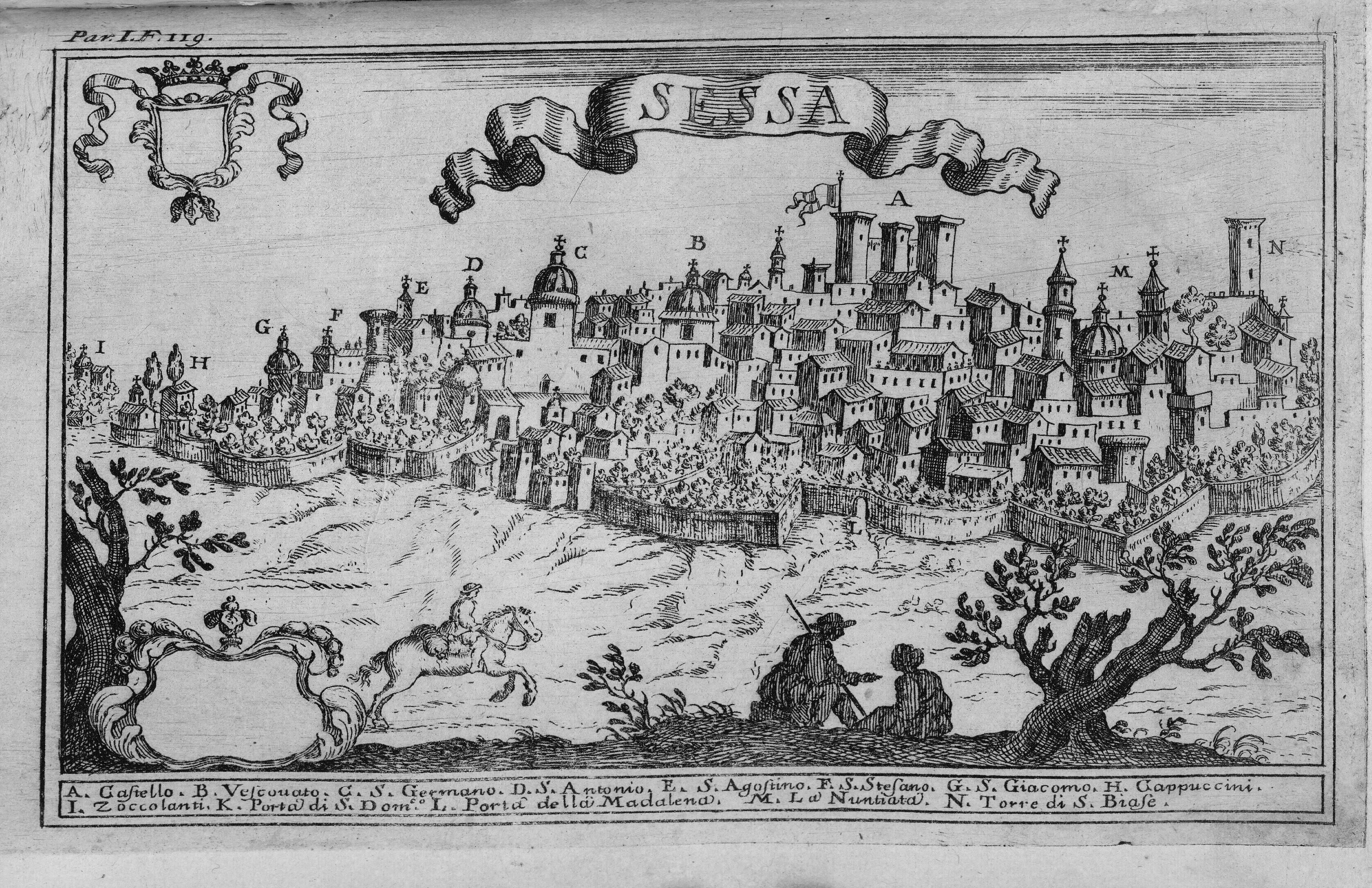 Autor: Pacichelli, Giovanni Battista, 1641-1702 Descripción bibliográfica: Il regno di Napoli in prospettiva : diviso in dodeci provincie, in cui si descrivono la sua Metropoli Fidelissima città di Napoli ... Opera postuma divisa in tre parti / dell'abatte Gio. Battista Pacichelli ; Parte prima [-terza] ... Del regno di Napoli in prospettiva / dell'abate Pacichelli. Parte prima. - In Napoli : nella Stamperia di Michele Luigi Mutio, 1703. - v. : principalmente il.; 4º . - Inic. adorn. y frisos dec. - Grab. calc. y h. pleg. grab. calc. de mapas de Cassianus de Silva. Ilustrador: Cassiano De Silva, Francesco, il. Impresor: Muzio, Michele Luigi, imp. Lugar de impresión: Italia. Nápoles Localización: Vea la ilustración en su contexto